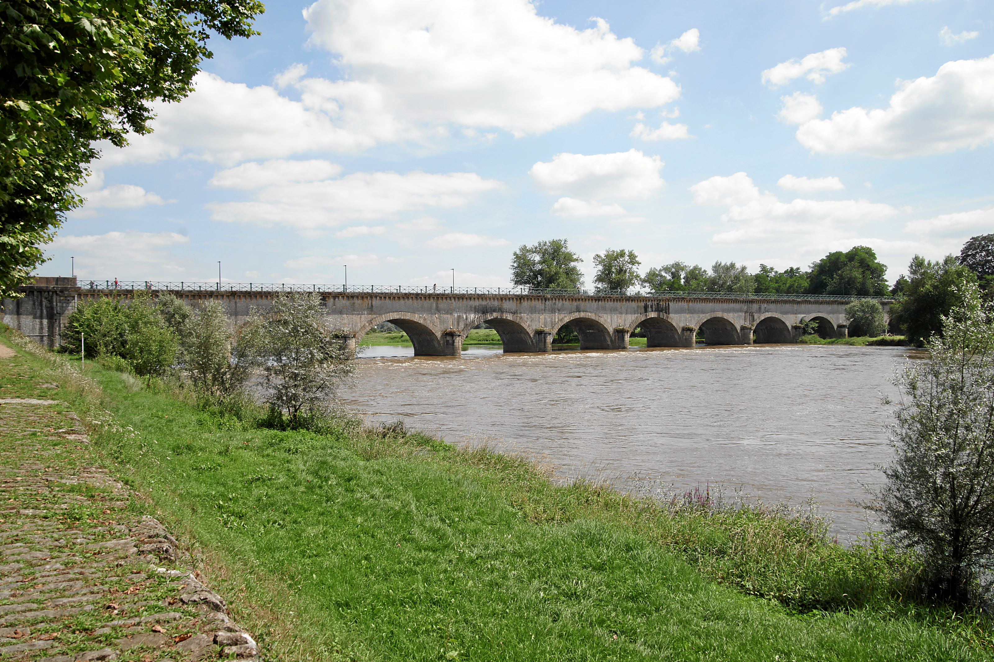 Pont-canal de Digoin